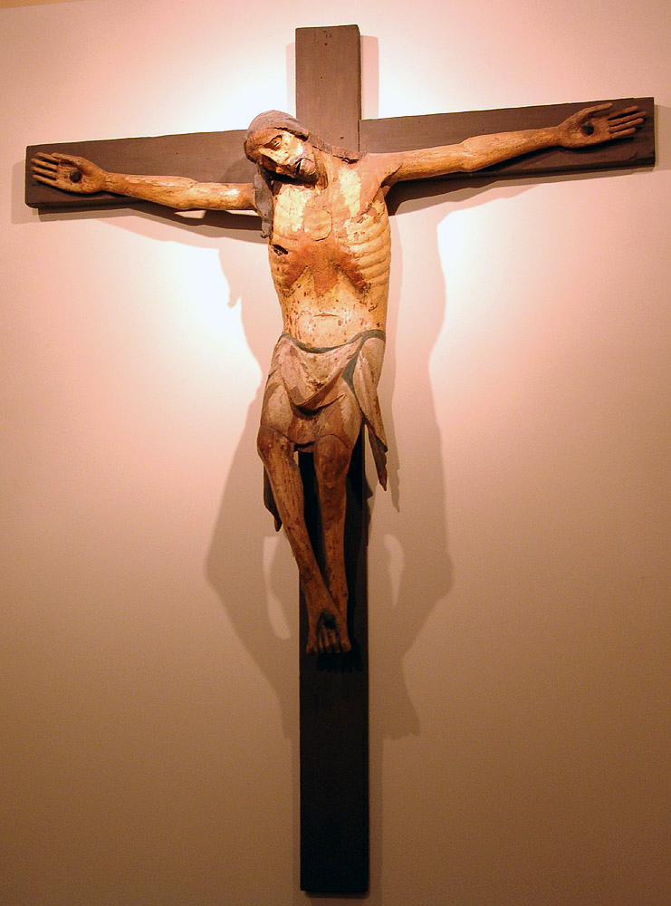 Frühe Christusdarstellung aus dem Jahre 1310 an der Wende von der Romanik zur Gotik, deutlich ist der romanische Aspekt der ausstrahlenden Hände sichtbar und die Öffnung an der Brust, jene Stelle, an der einst die Hostien aufbewahrt wurden. Das Kreuz stammt aus der Gegend um Herzogenburg in Niederösterreich und wird im gleichnamigen Stift ausgestellt